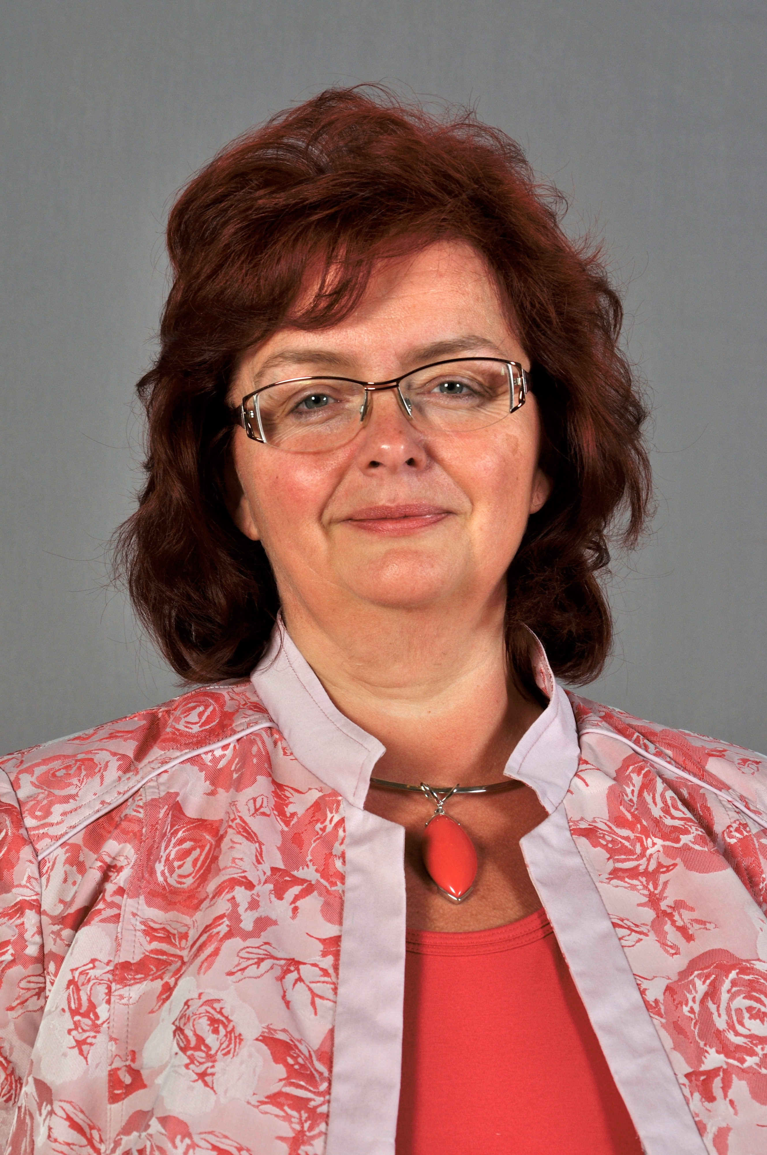 Ilona Tröls-Holzweber, Abgeordnete zum Niederösterreichischen Landtag.